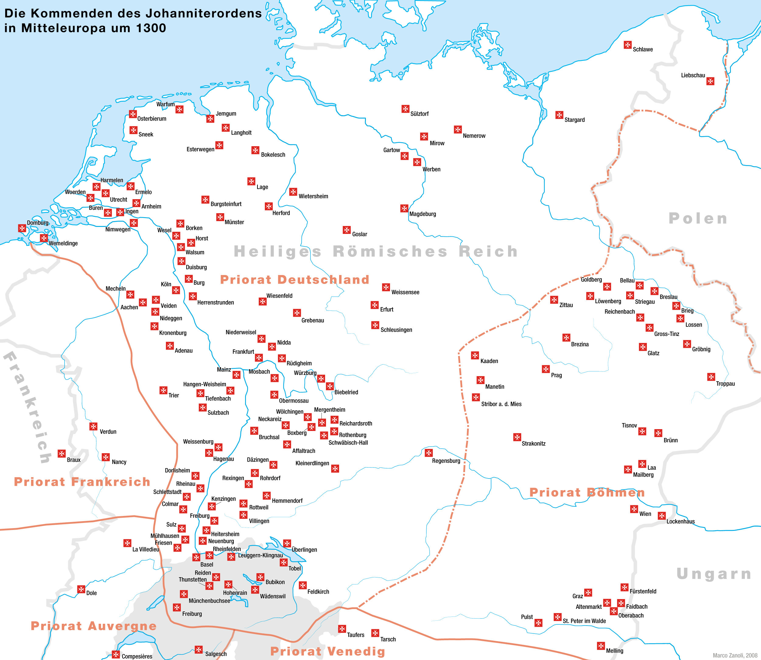 Die Kommenden des Johanniterordens in Mitteleuropa um 1300. Karte aus der Saisonausstellung 2008 im Ritterhaus Bubikon ("Die Kreuzzüge eine Spurensuche: Die Ritterorden in der Schweiz").